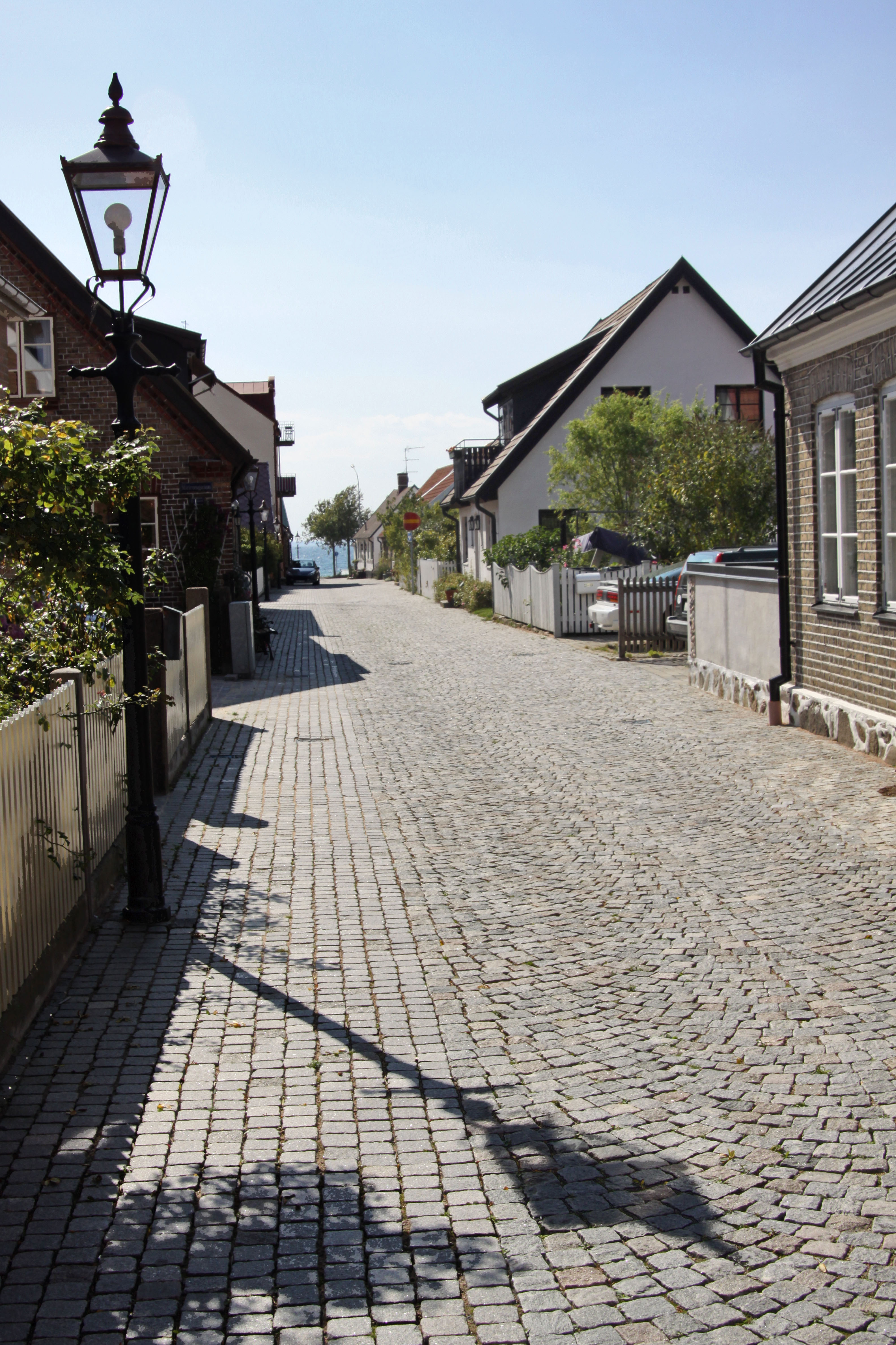 Helsingborg. Det gamla fiskeläget på Råå.